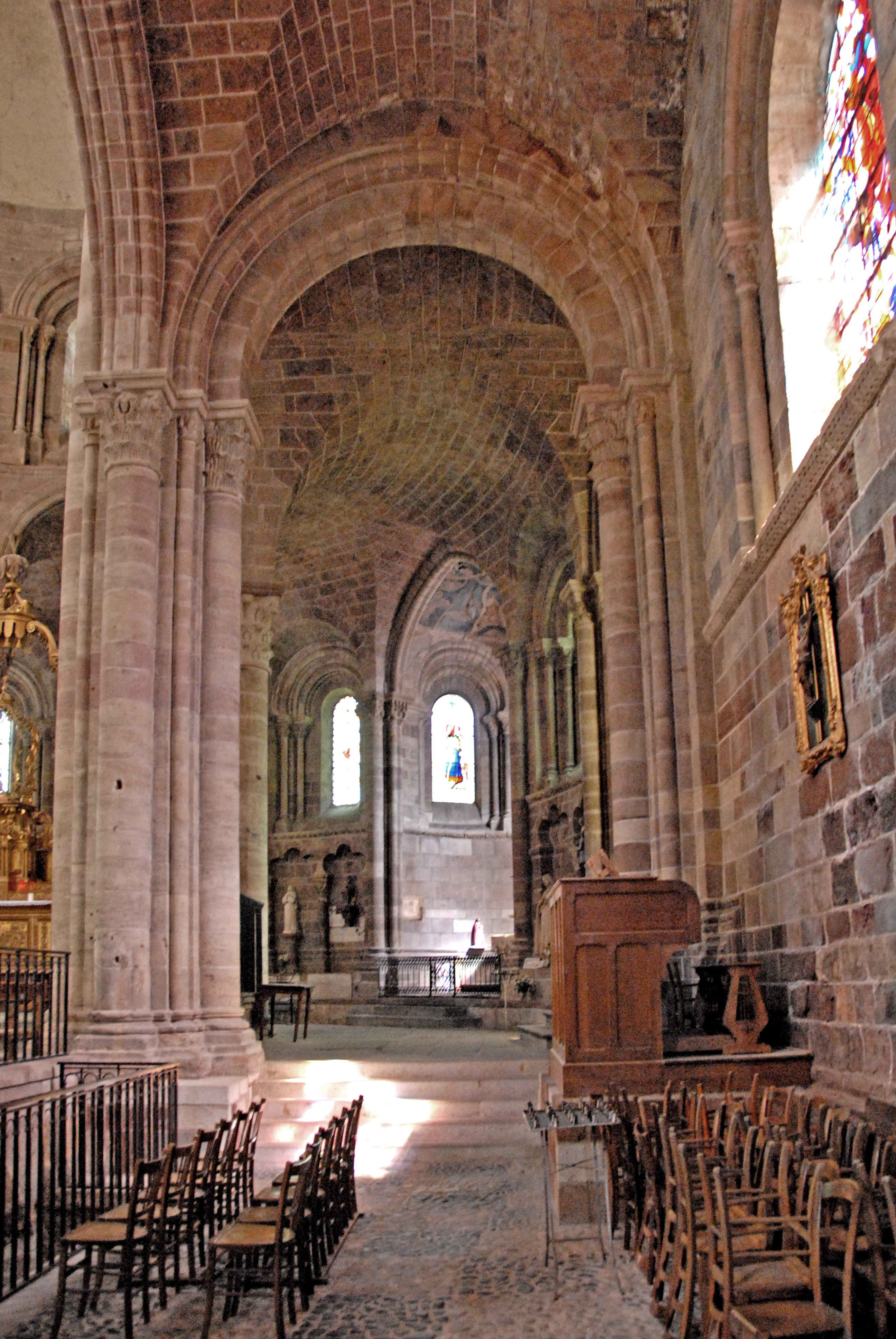 Sain-Julien Brioude, SO-Querhausarm, Umgang